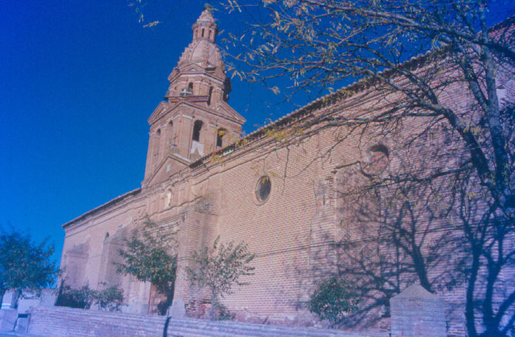 Iglesia de Santa María del Castillo - Torrecilla de la Orden (Valladolid) - Diapositiva 48 x 48 Color